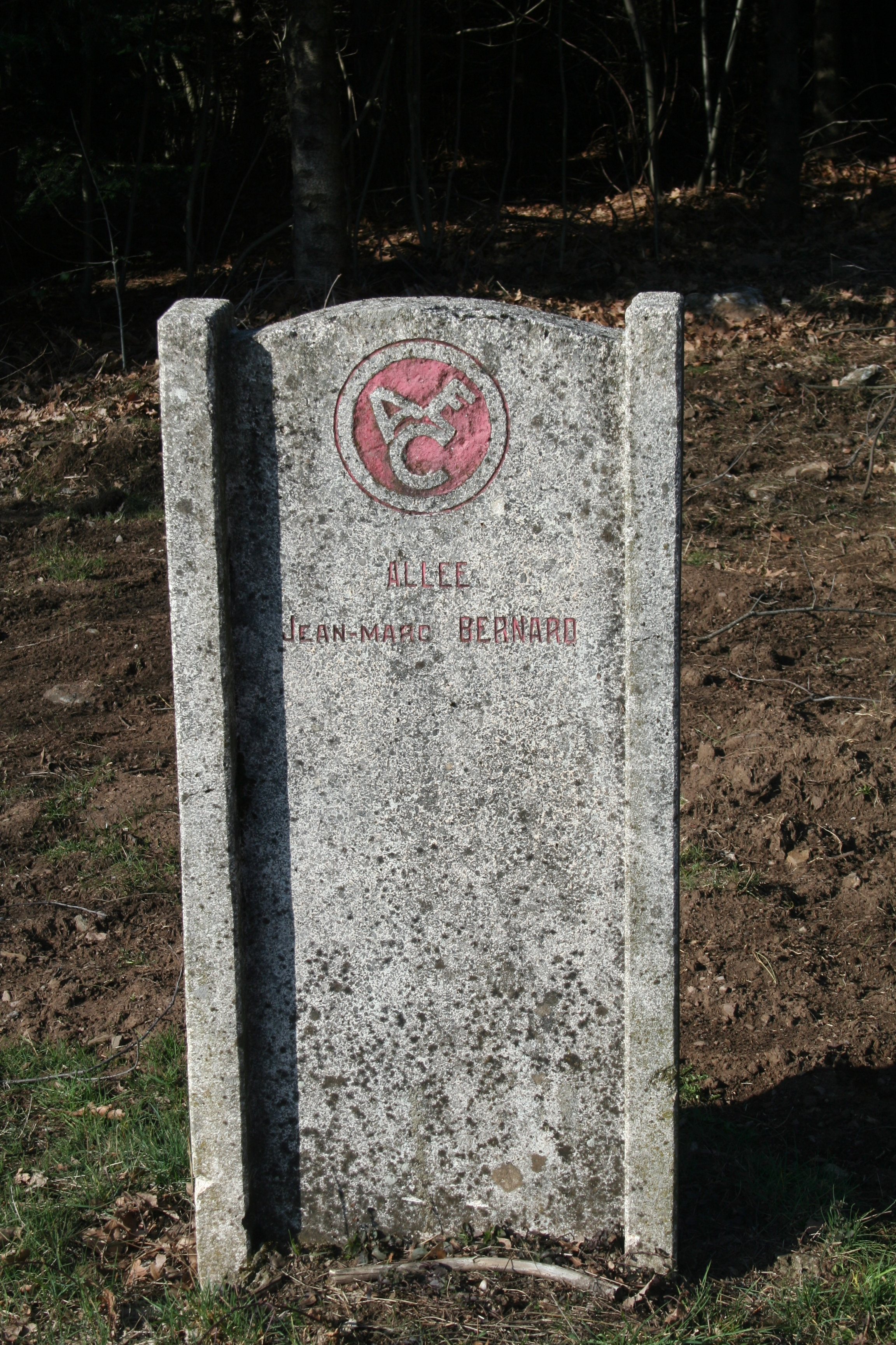 Combes (Hérault) - forêt des écrivains combattants - stèle Jean-Marc Bernard (1881-1915).